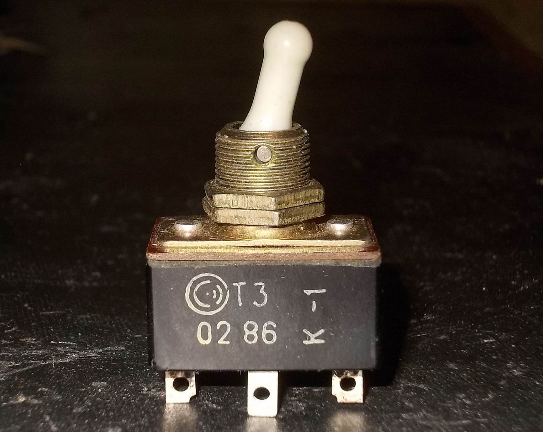 Тумблер (переключатель электрических цепей в радиоэлектронной аппаратуре)